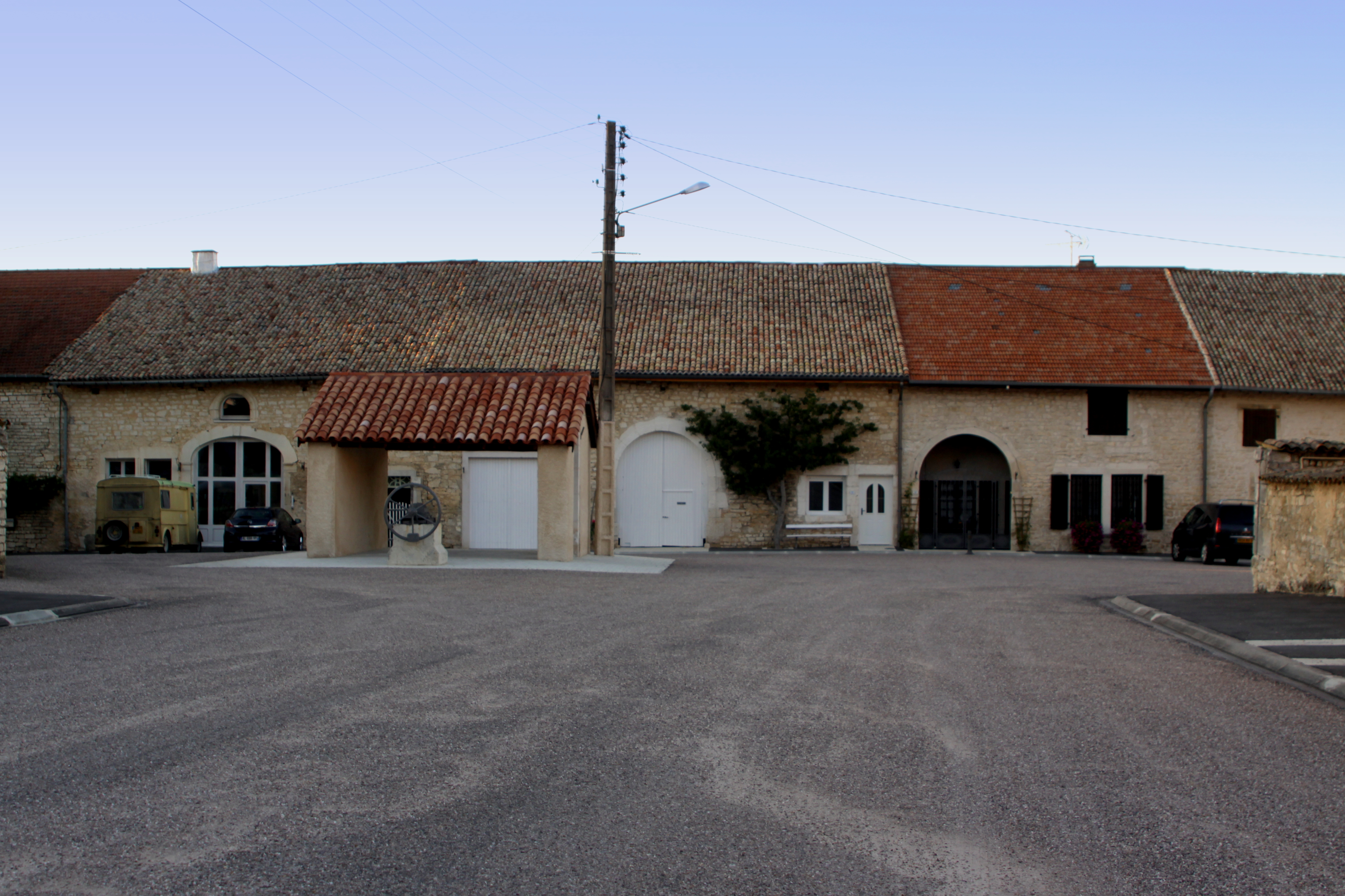 Duerfplaz vu Montbras